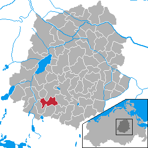 Jürgenstorf, Landkreis Demmin, Mecklenburg-Vorpommern